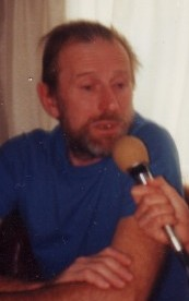 Nino Ferrer, chanteur-compositeur français.